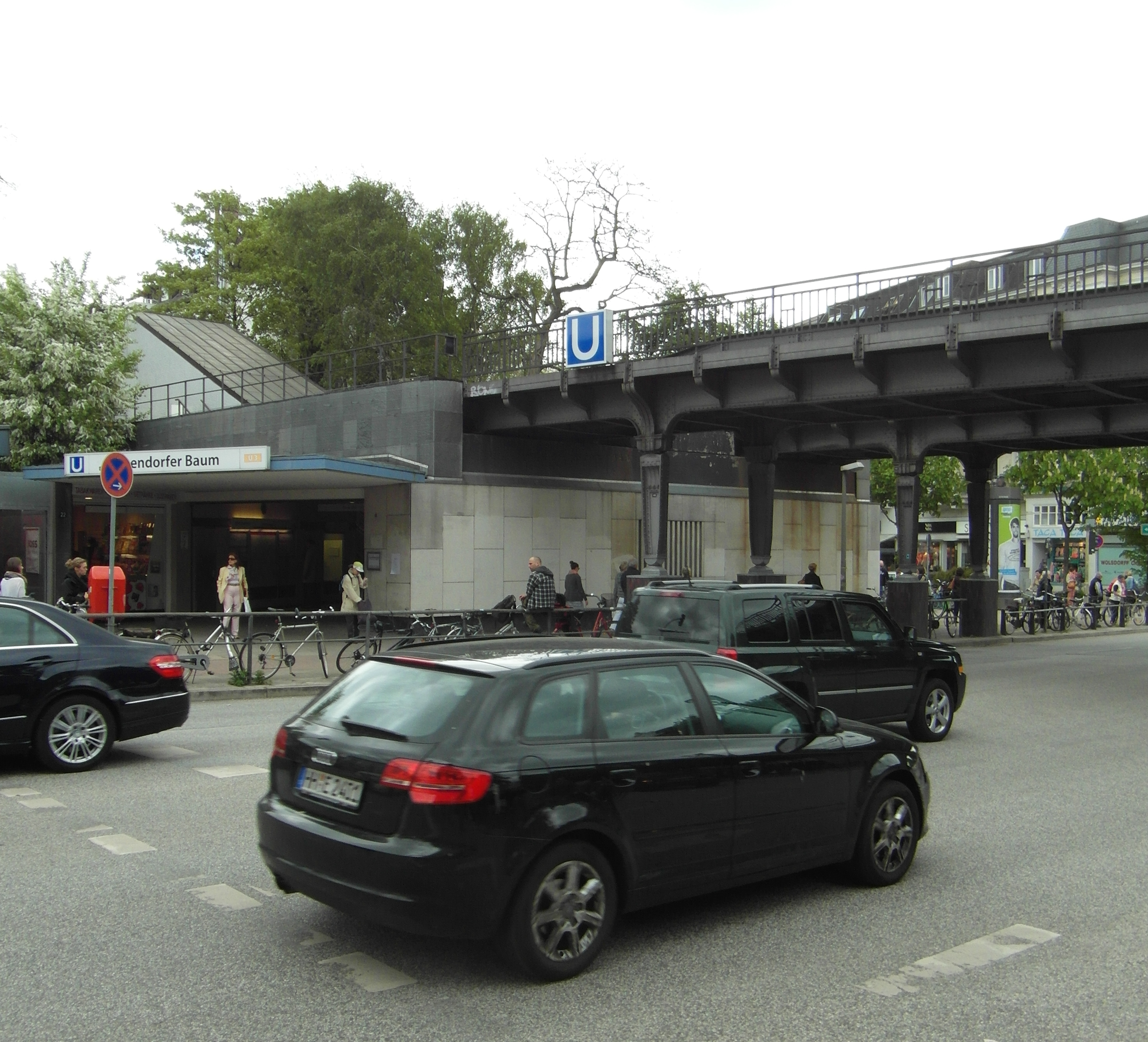 Hochbahnhof Eppendorfer Baum der U-Bahn in Hamburg - Ringlinie U3